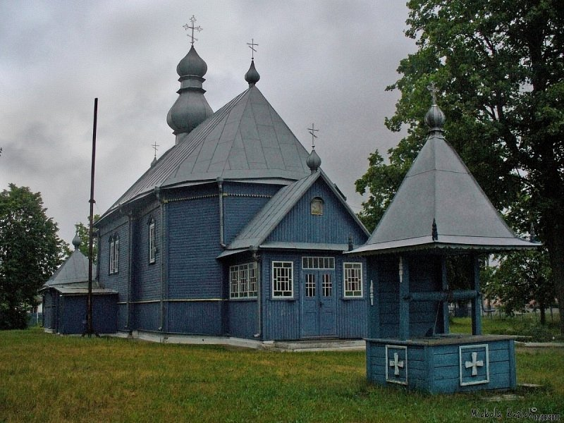 Ляхаўцы. Царква